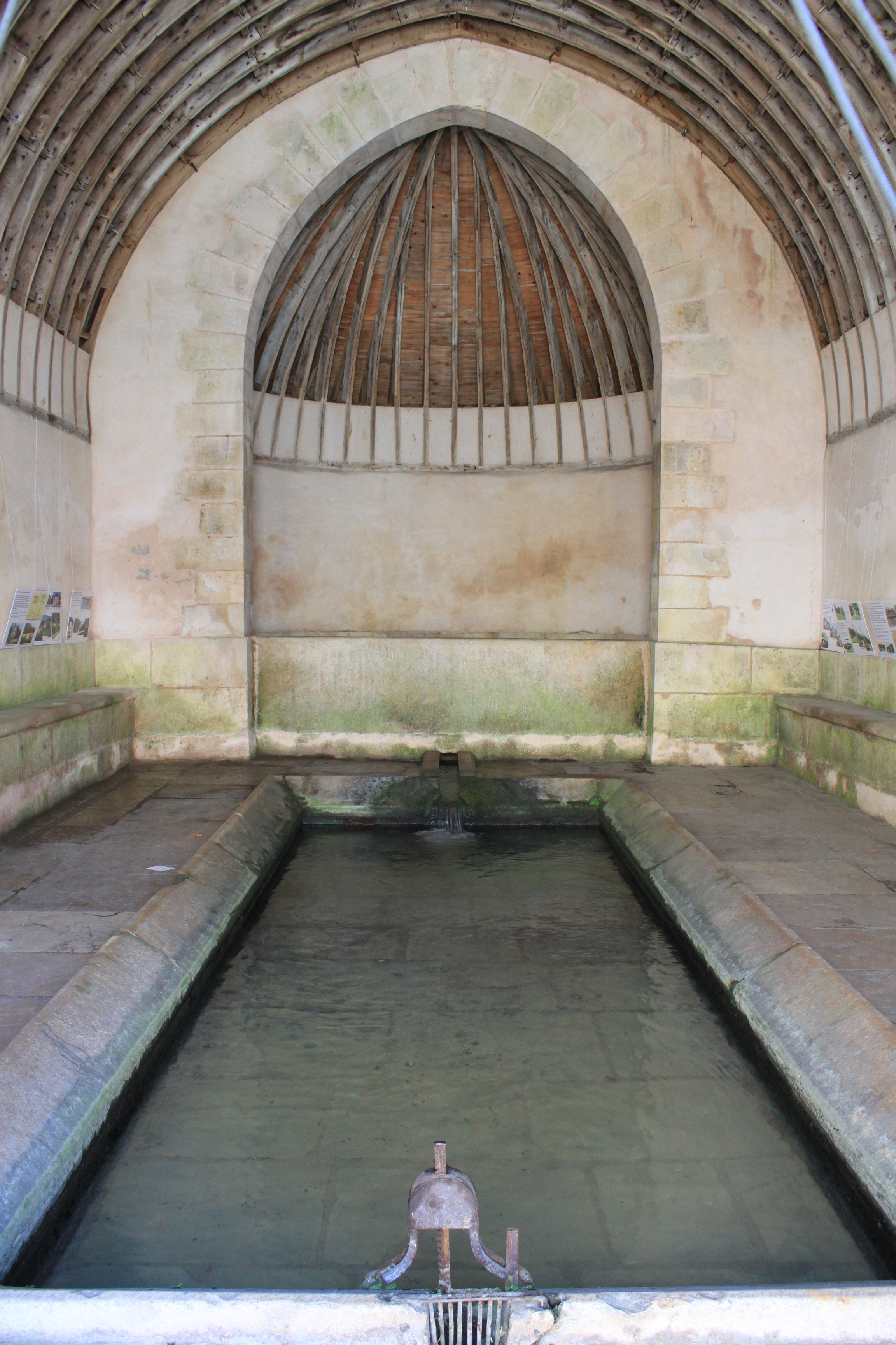 Druyes-les-Belles-Fontaines, Yonne, Bourgogne, France